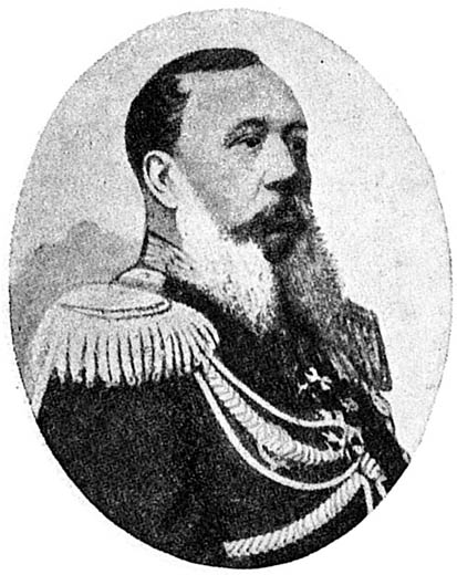 генерал П. К. Меньков. Эта фотография была использована для иллюстрирования статьи «Меньков, Петр Кононович» опубликованной в пятнадцатом томе «Военной энциклопедии», который был издан книгоиздательским товариществом И. Д. Сытина в 1914 году в столице Российской империи городе Санкт-Петербурге. Более подробное описание к этому рисунку можно прочесть в указанной выше статье на сайте Русской Викитеки.